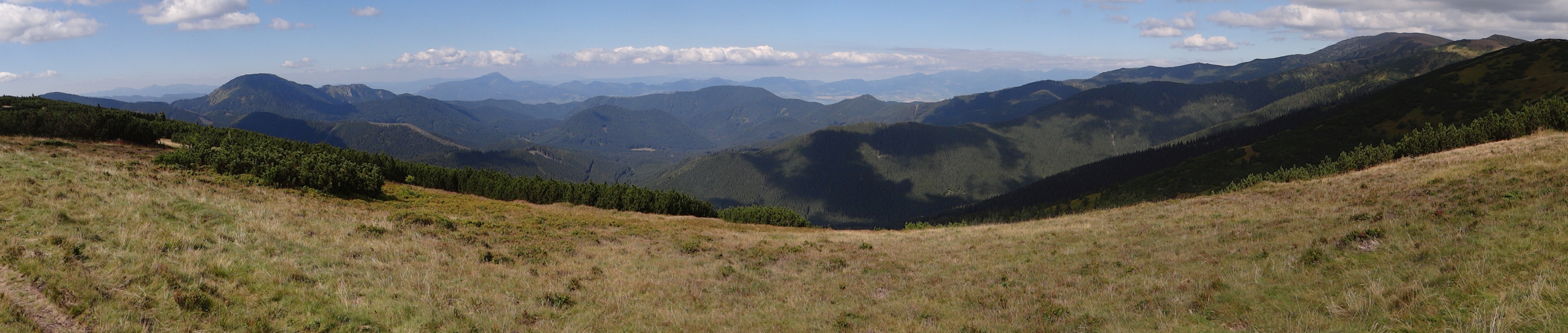 View from Zamostská hoľa